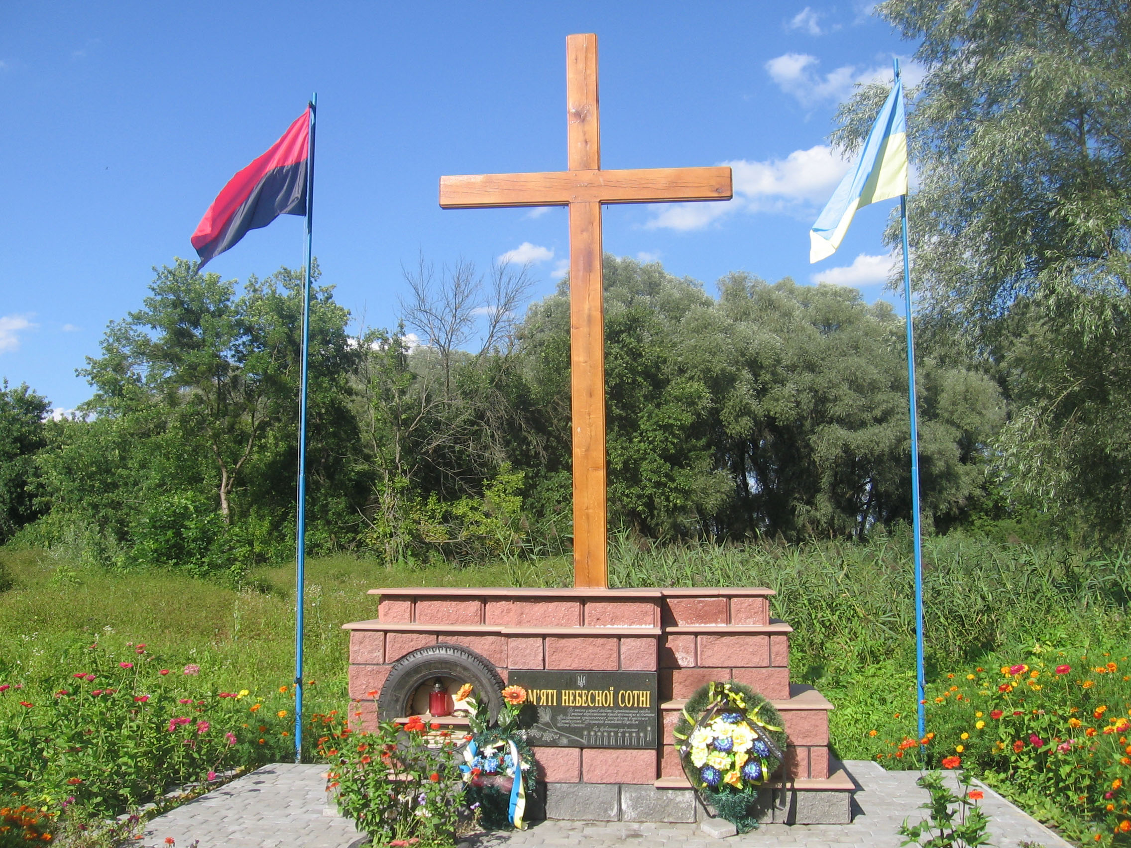 Пам'ятний знак Небесній Сотні у м.Дубно на Острівку